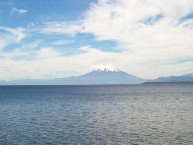 Vista del Lago Llanquihue desde la ciudad de Puerto Varas (Chile)